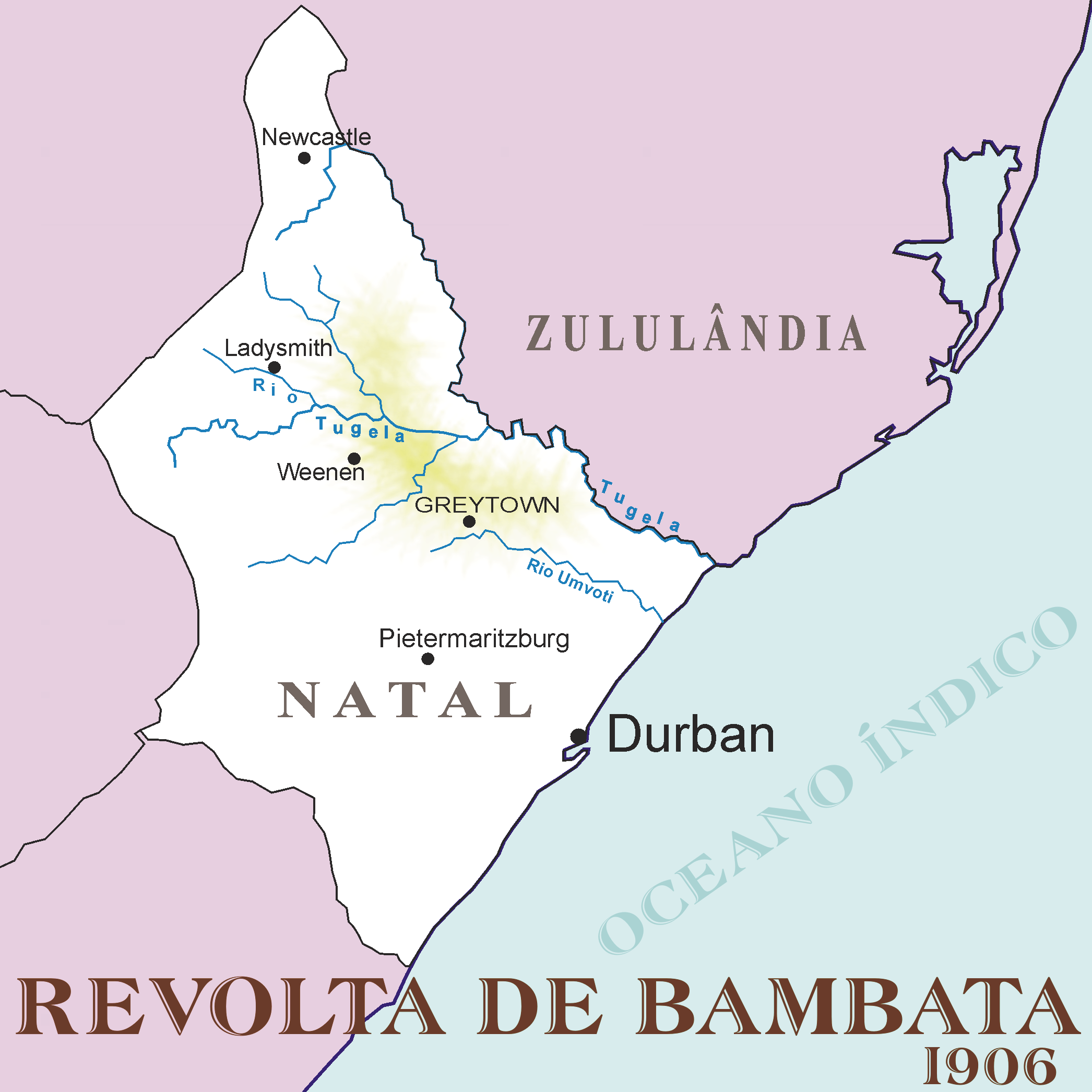 Mapa demonstrativo dos eventos da Rebelião de Bambata, na África do Sul, em 1906